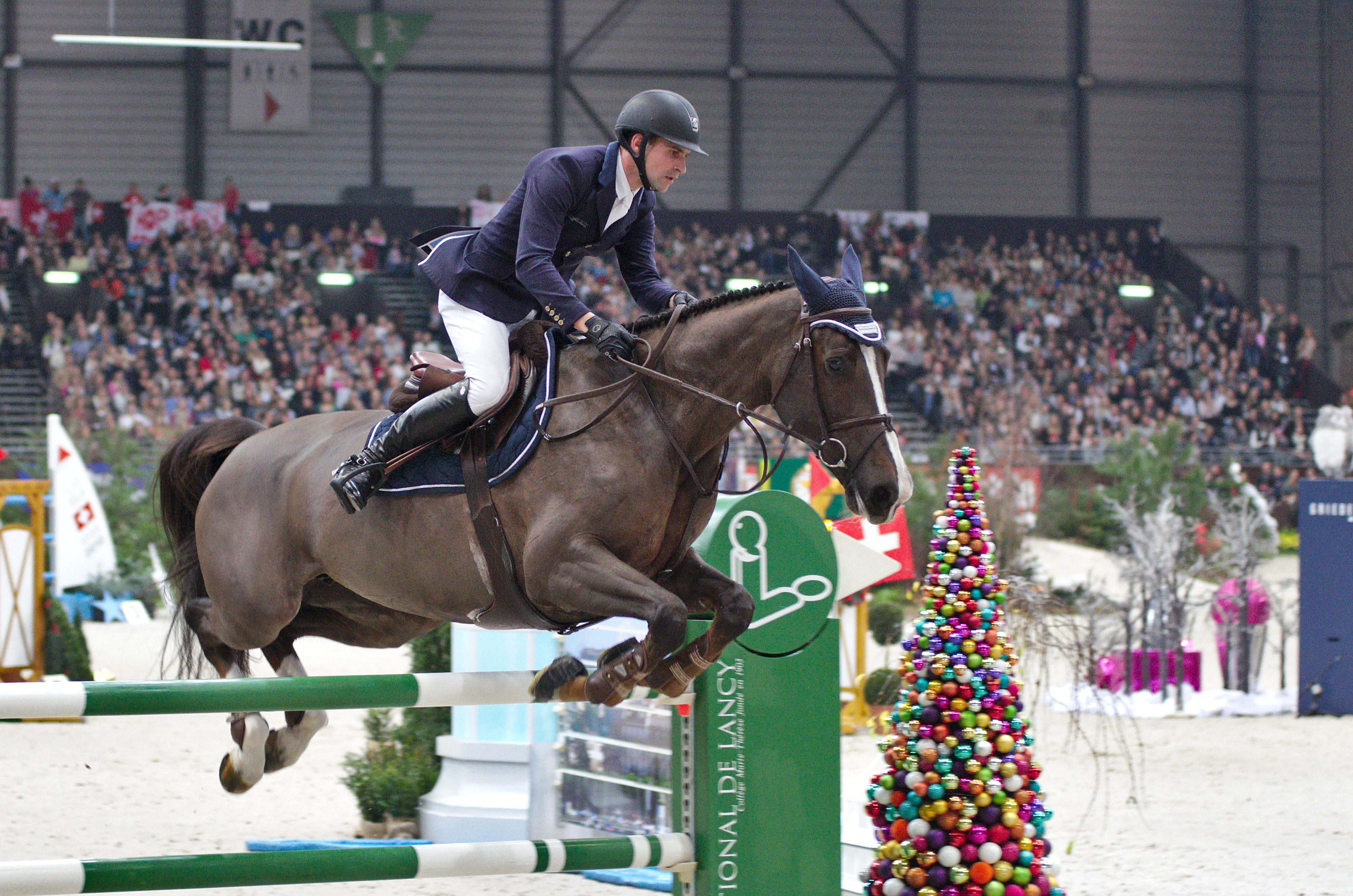 CHI Genève 2013 - 20131214 - Romain Duguet et Quorida de Treho